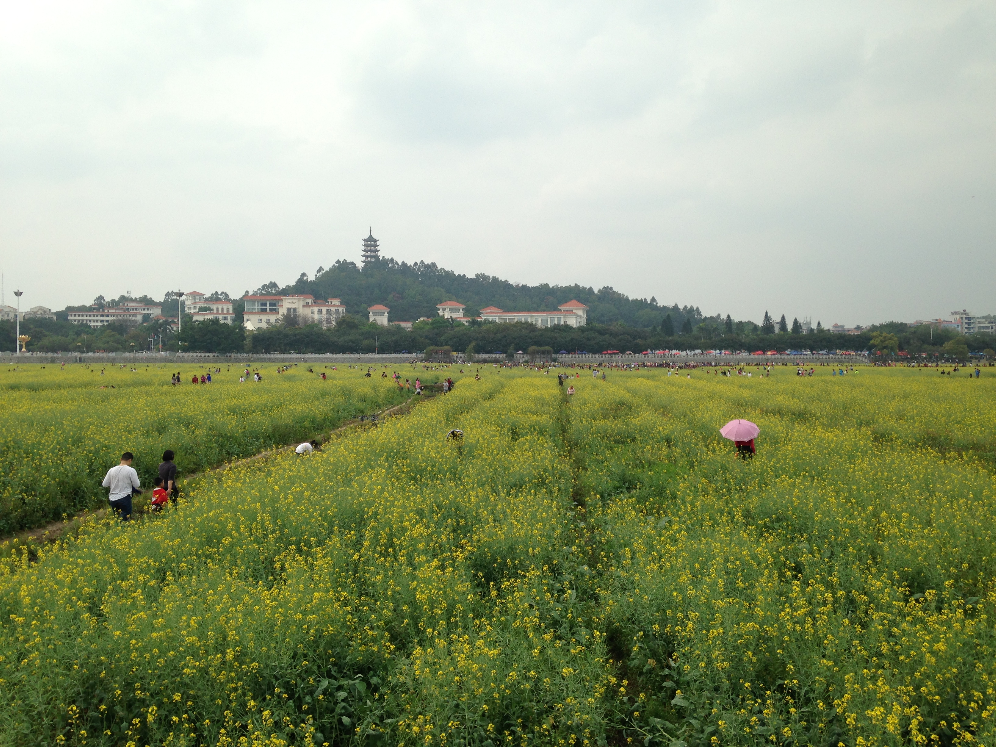 粵語: 東莞市橋頭鎮嘅油菜花田 Bân-lâm-gú: Kńg-tang Tong-kóan-chhī Kiô-thâu-tìn-ê iû-chhài-hoe-chhân